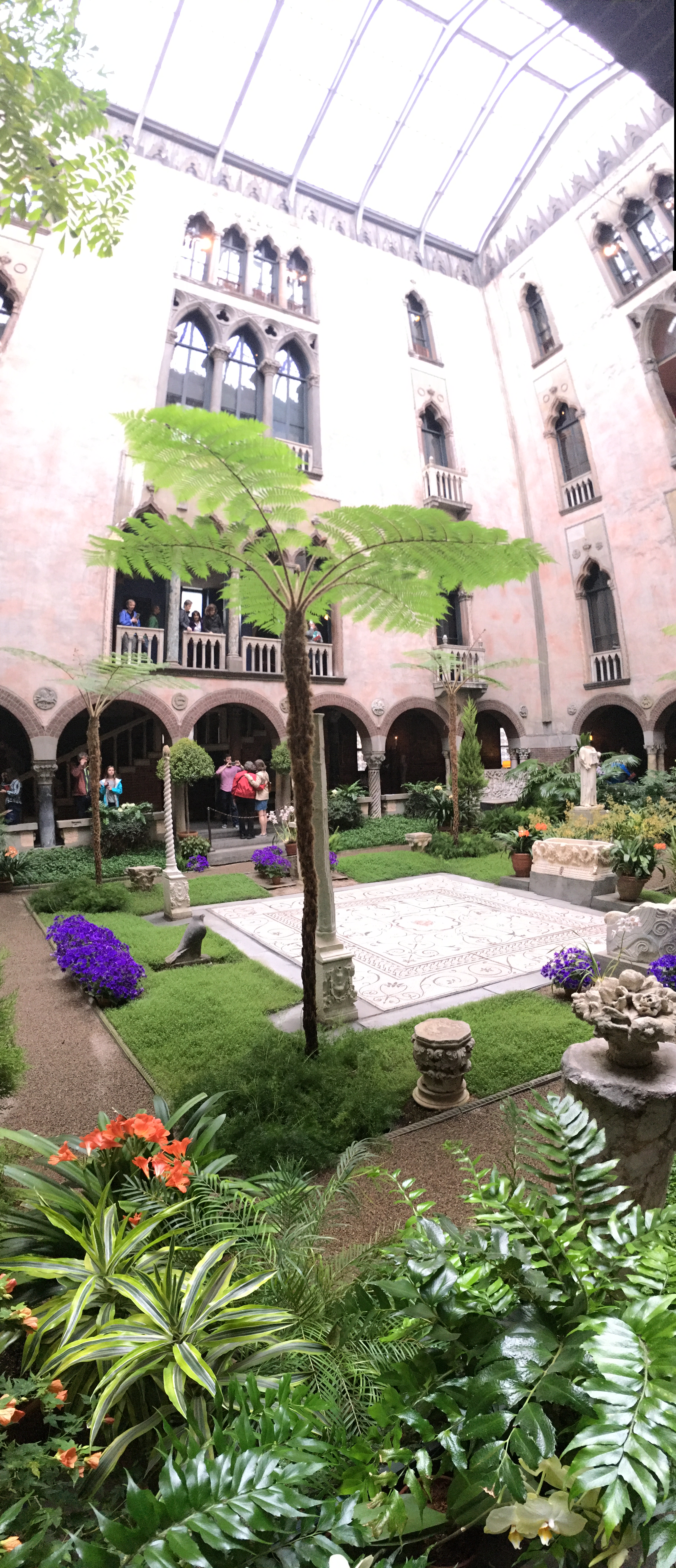 Isabella Stewart Gardner Museum interior